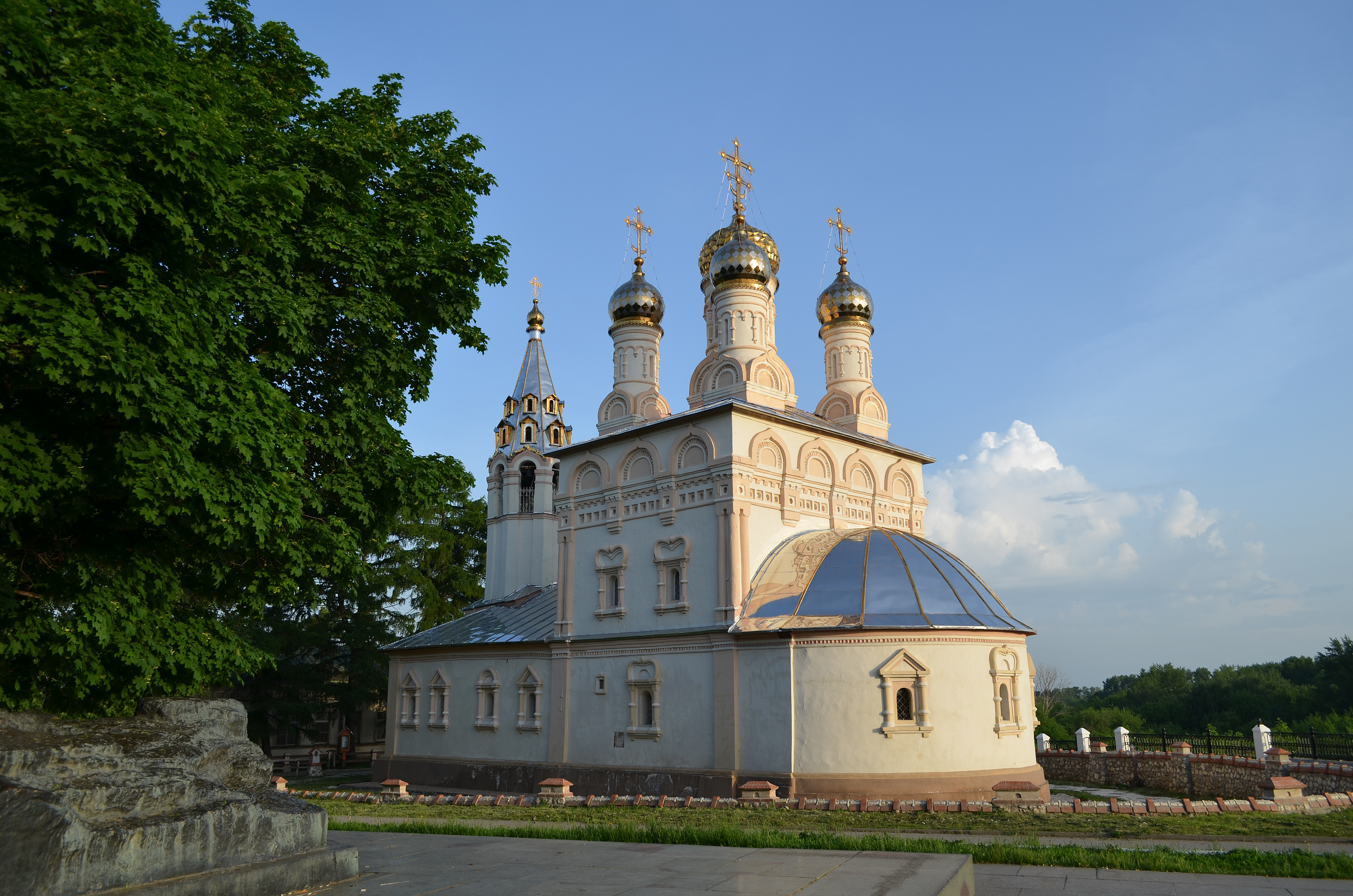 Рязань.Церковь Спаса-на-Яру(1695).